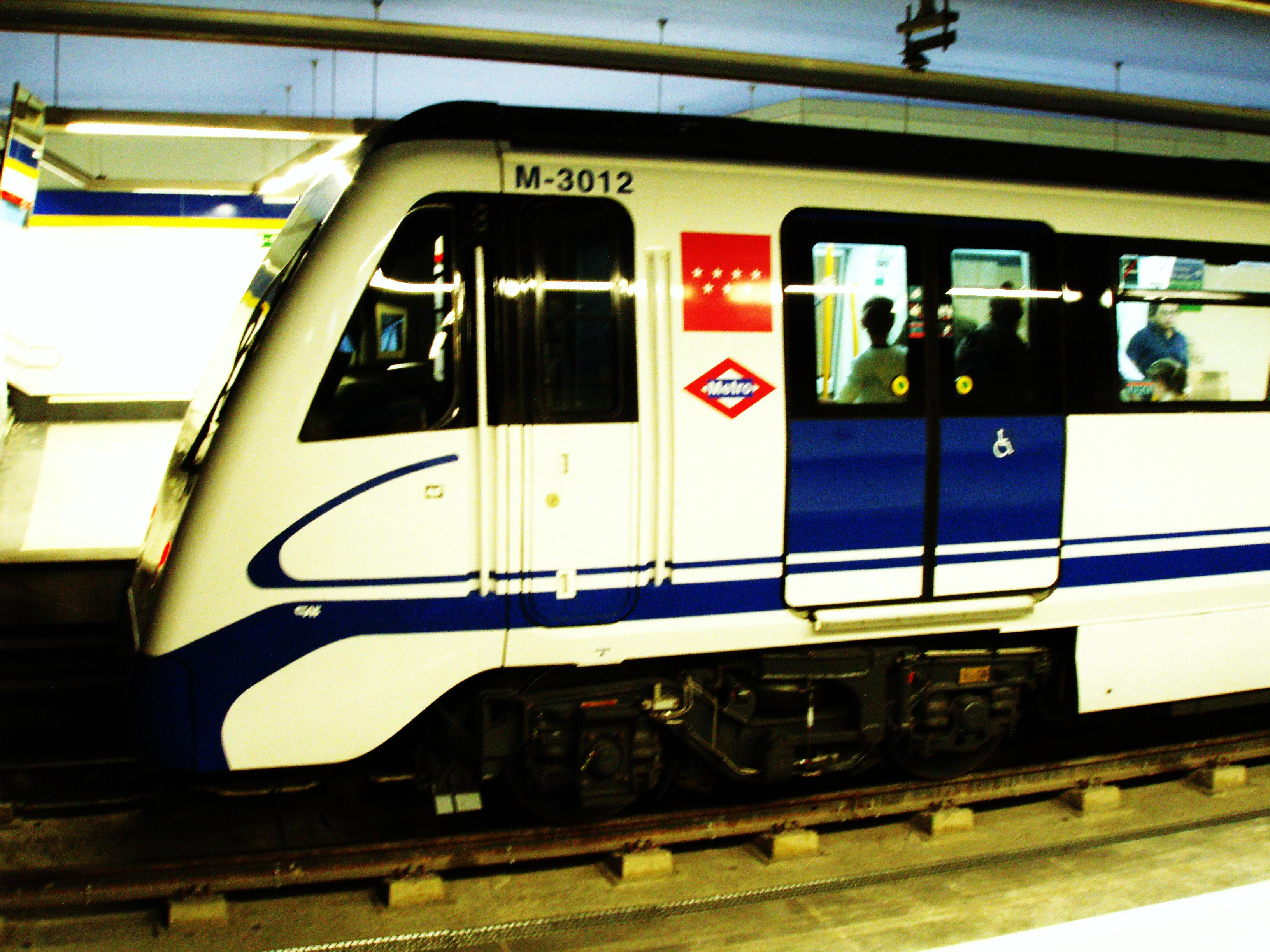 Plaza de España